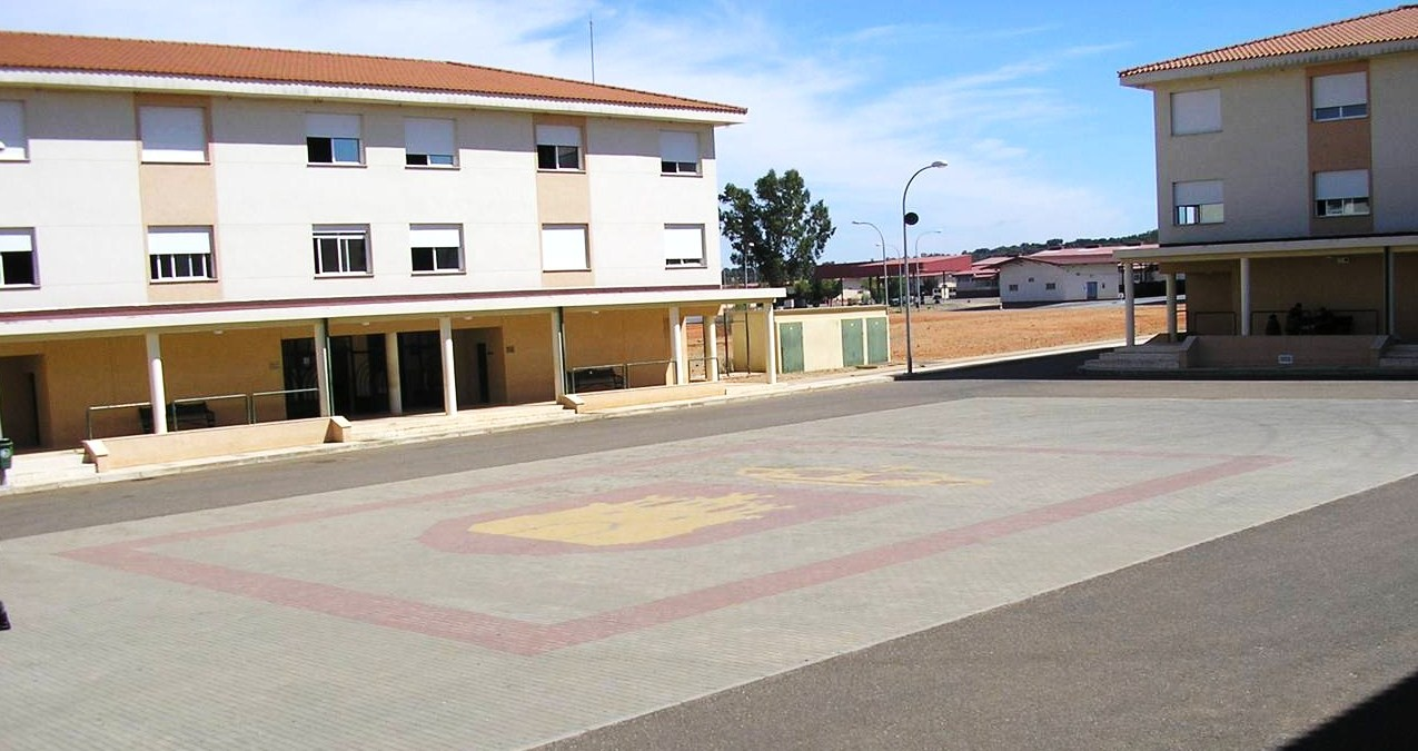 Patio de zona de mando del RIMZ en la Base General Menacho-Botoa-Badajoz